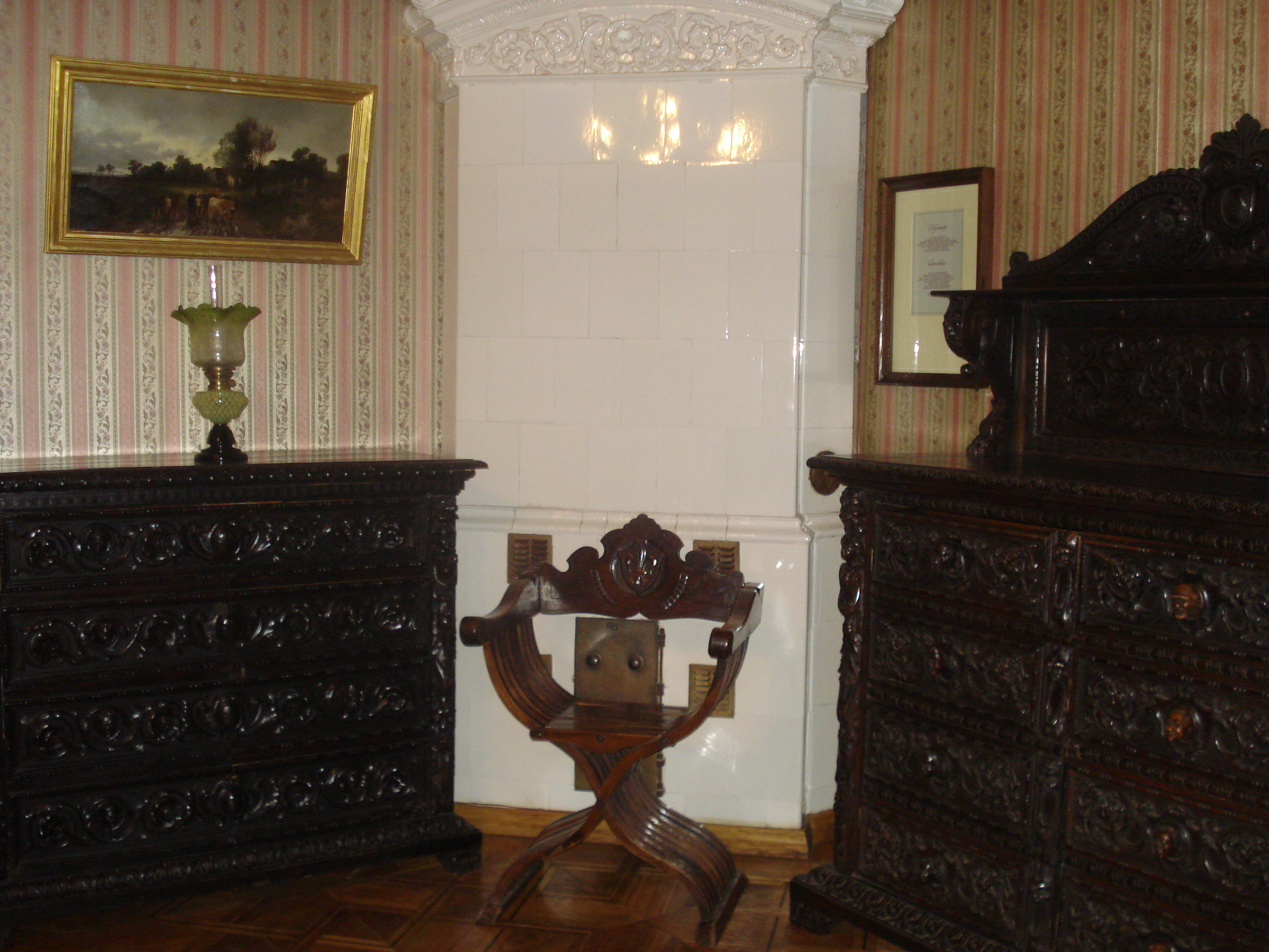 Dinning room. Alexander Pushkin Museum in Vilnius. Valgomasis (Literatūrinis Aleksandro Puškino muziejus. Subačiaus g. 124)